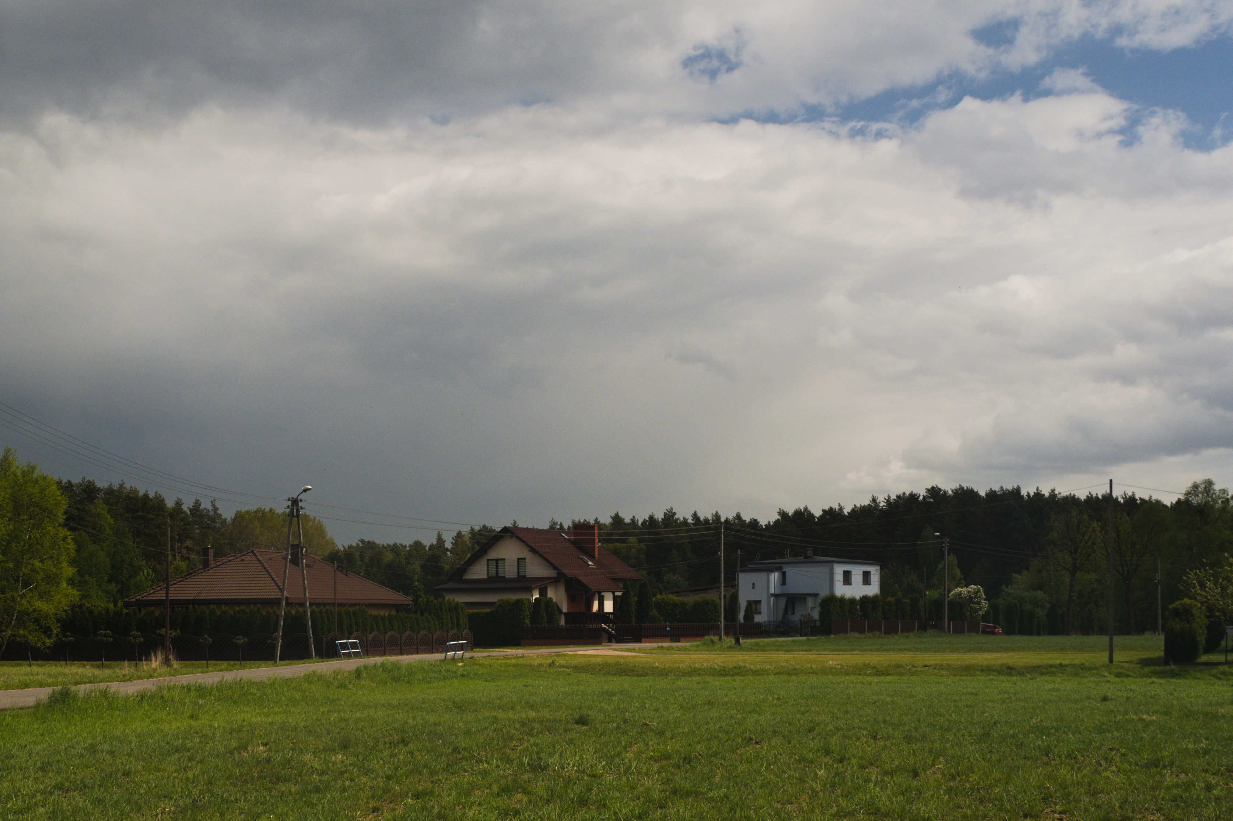 domy przy ul. Chemików (od lewej: 11p, 11a, 11) w Tarnowskich Górach (Tłuczykąt)